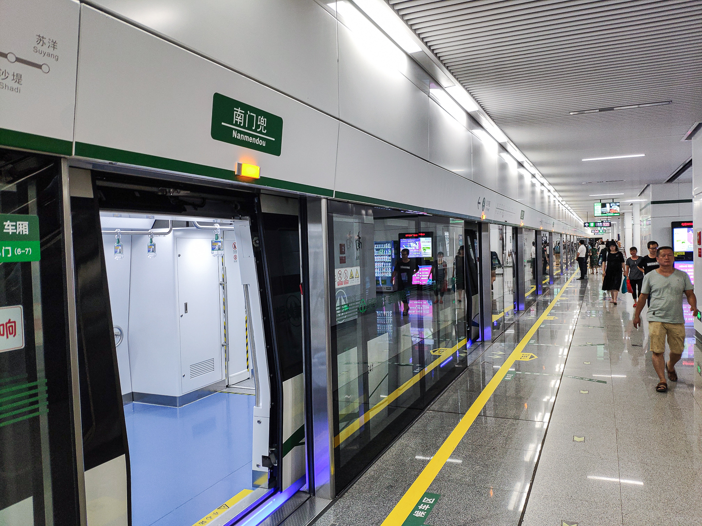 中文（中国大陆）: 南门兜站2号线往洋里方向4站台